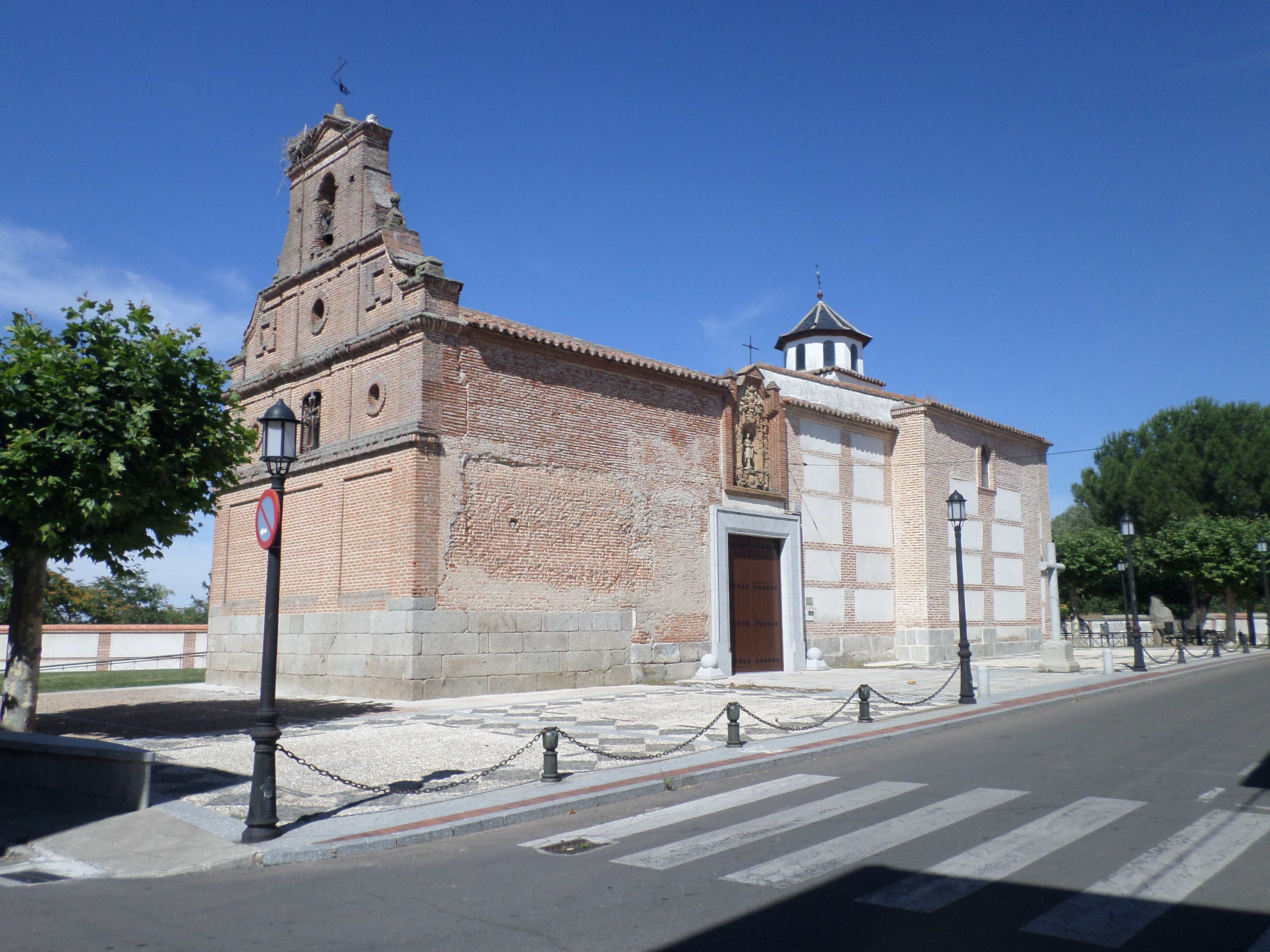 Ermita de San Luis ubicada en Peñaranda de Bracamonte. Este templo, en el ala oriental de la ciudad, data de 1643, auqneu hubo de ser restaurado en 1959.